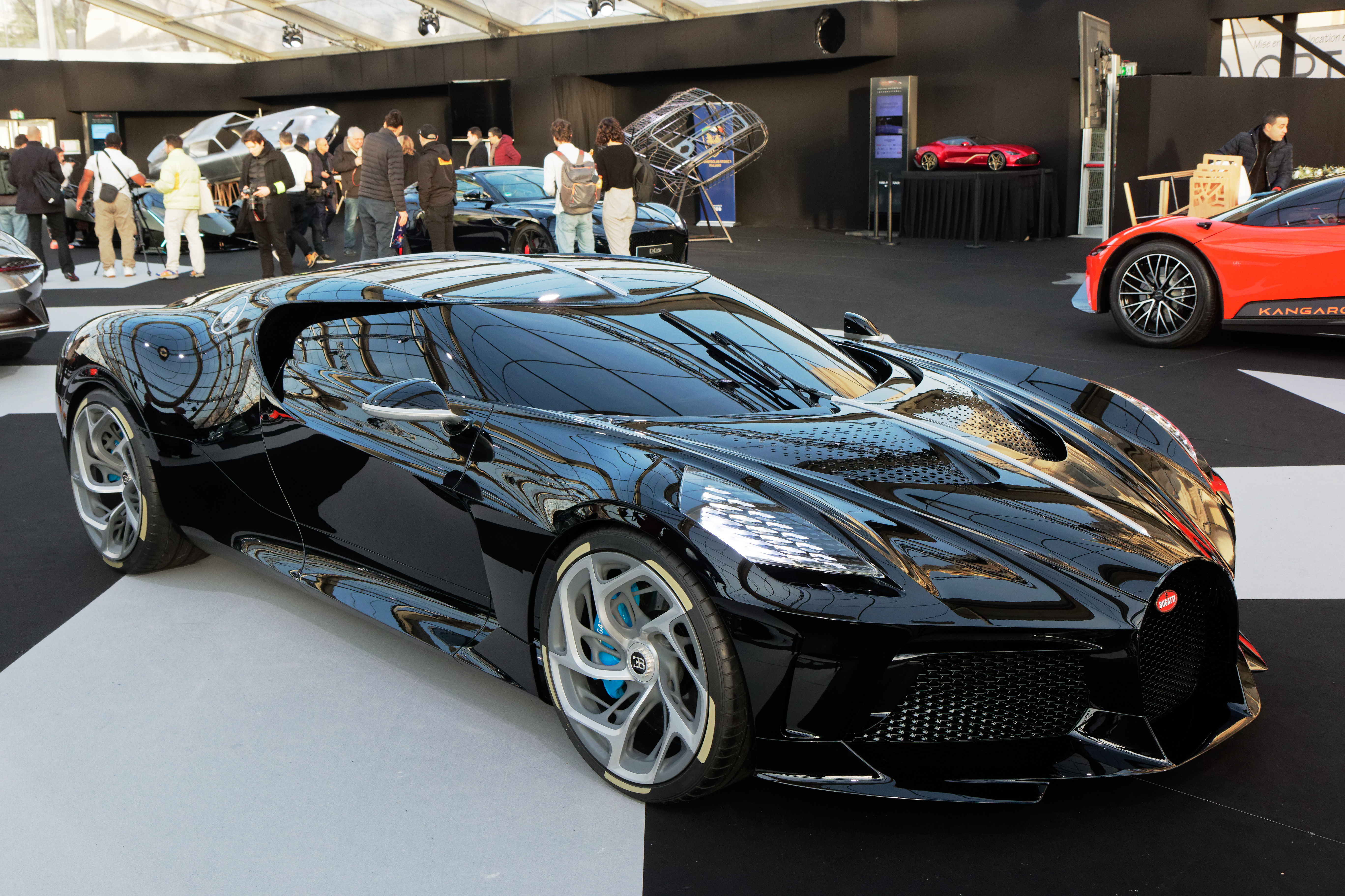 Une Bugatti La Voiture Noire exposée lors du festival automobile international 2020